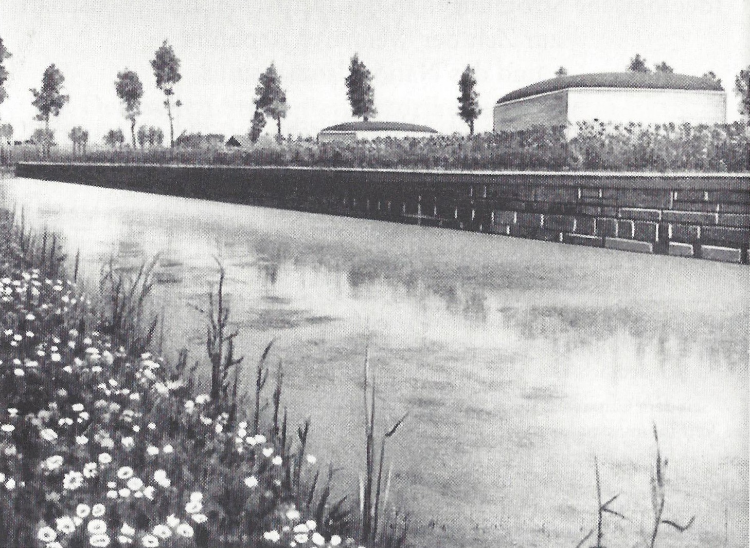 Fotografie der Deutschen Kriegsgräberstätte Langemark.